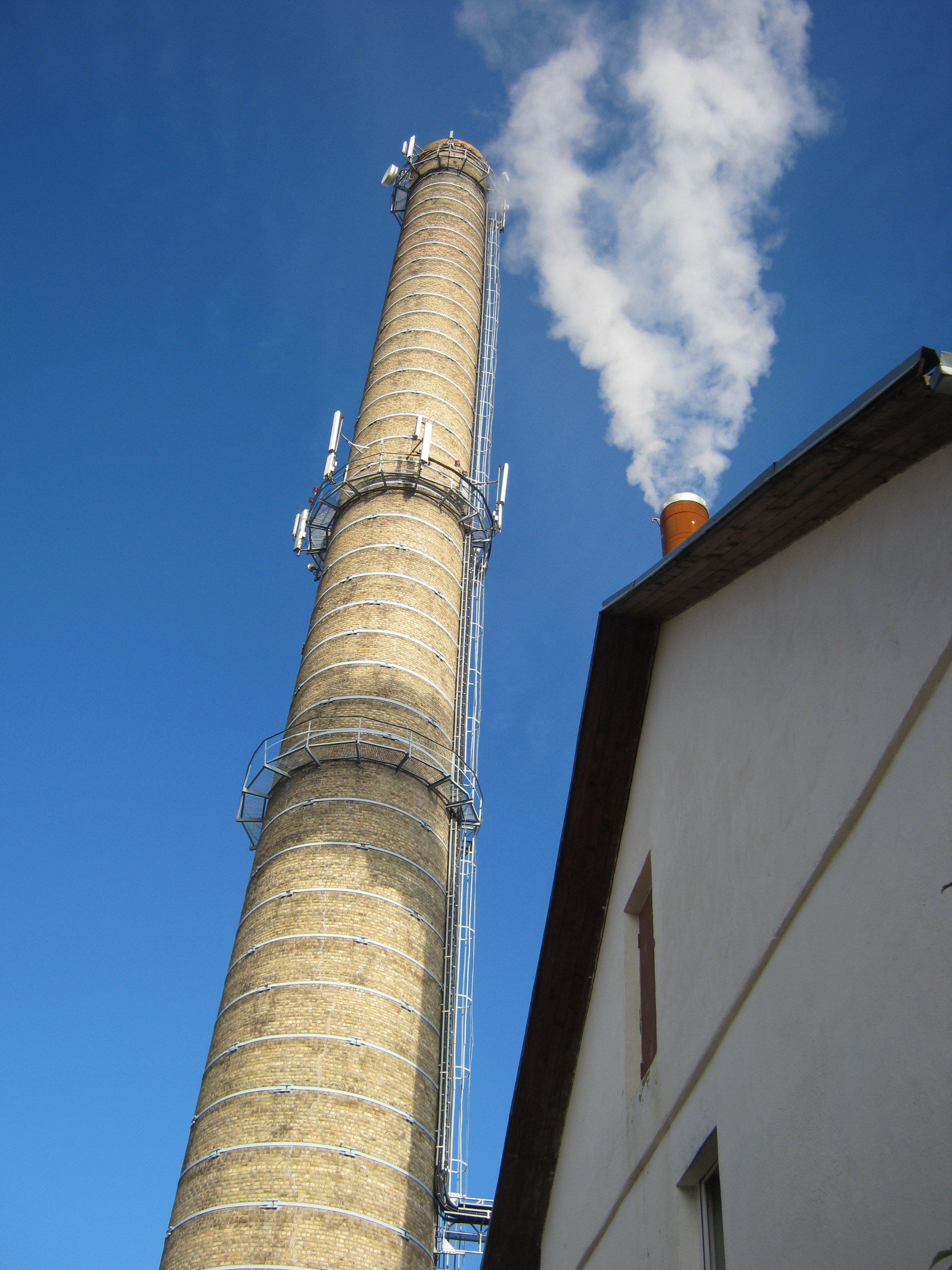 Jonava